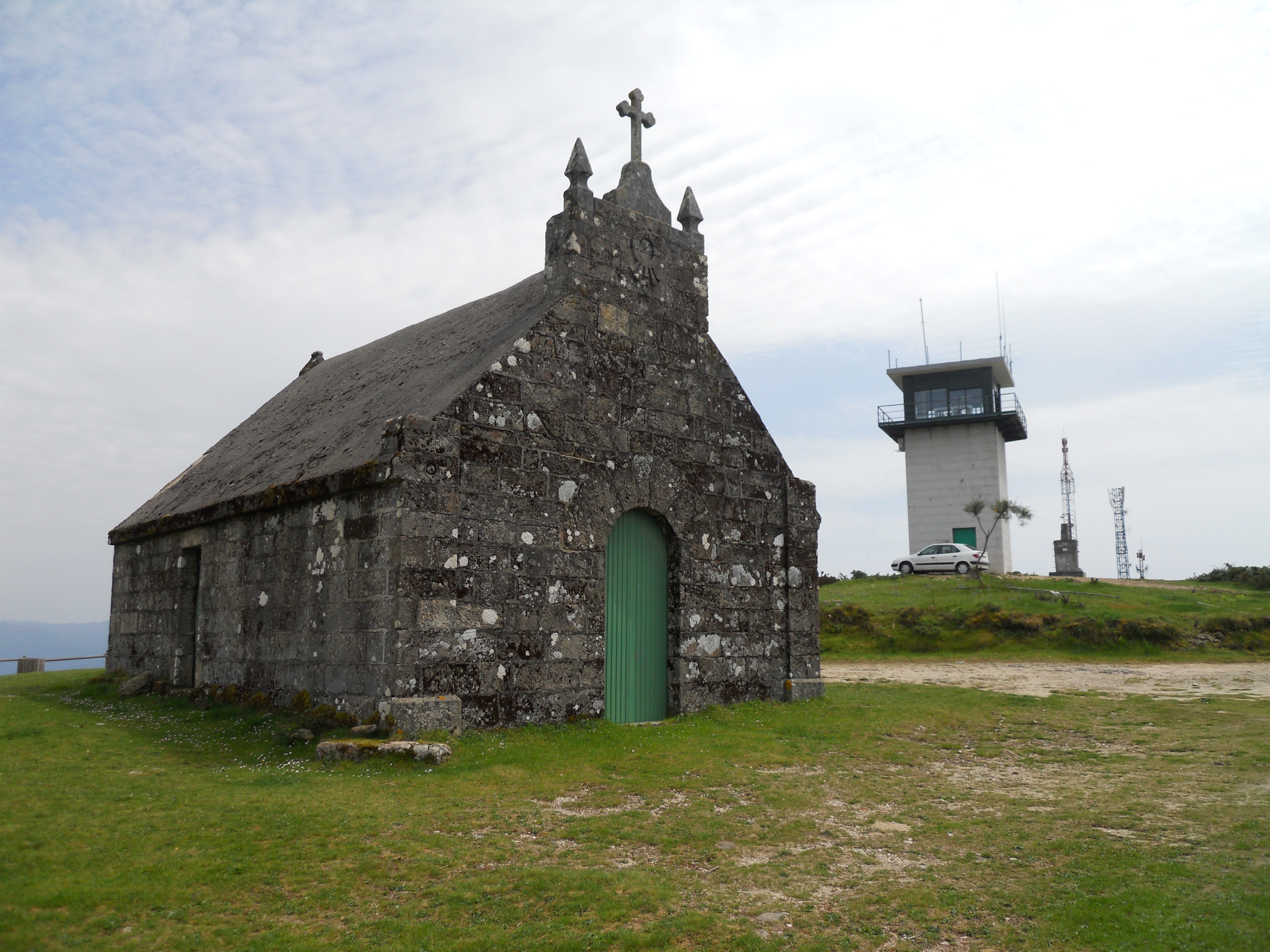 Esta foto participó en el juego En otro lugar de Flickr.